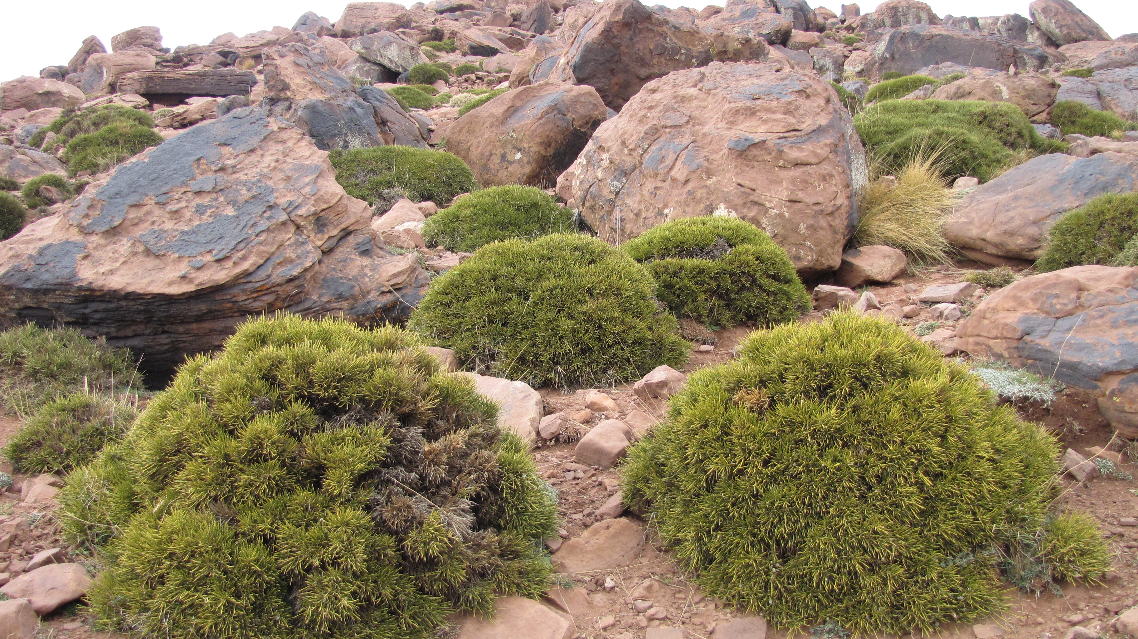 Arpetan: Habitat avec des xerophytes et des roche de grès